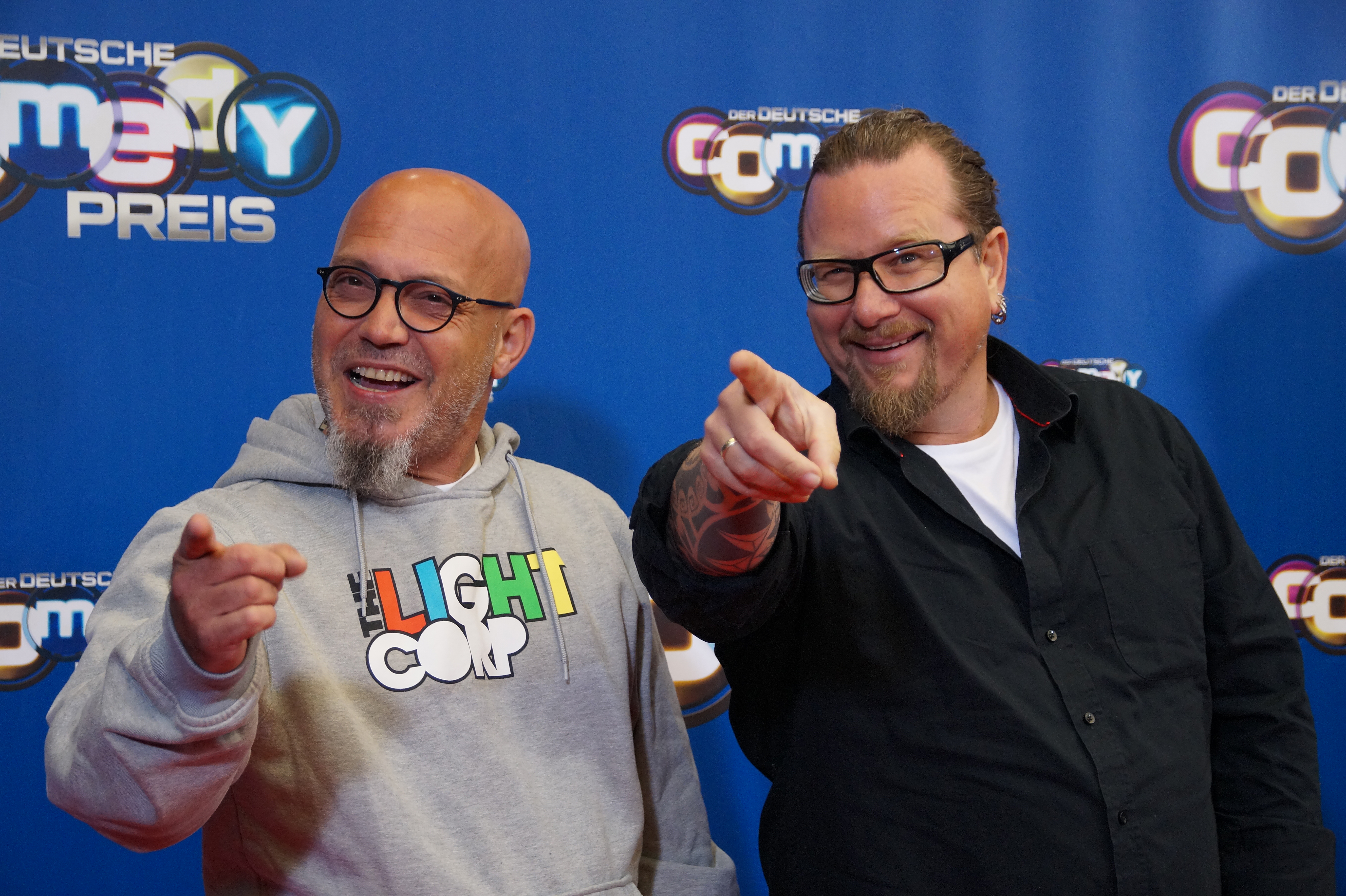 Mundstuhl beim Comedypreis 2016, Oktober, Köln.